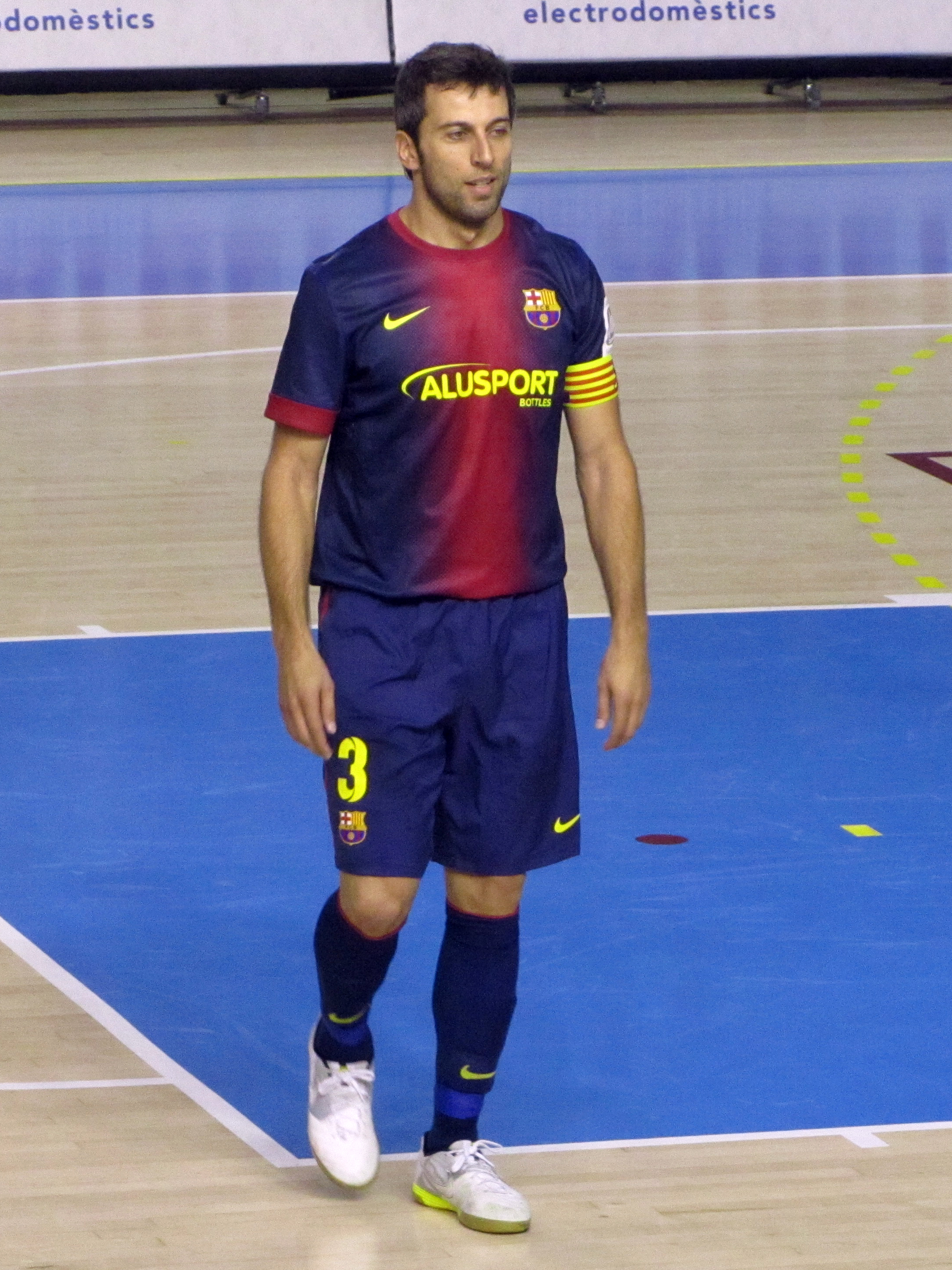 Foto realizada por Javier Segura (@castroquini en Twitter)